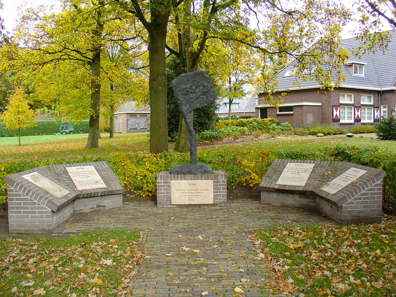 Herdenkingsmonument Westerbork waarin opgenomen 'De Vlag' van Armando en 'Du ciel la liberté' van Charles Hammes